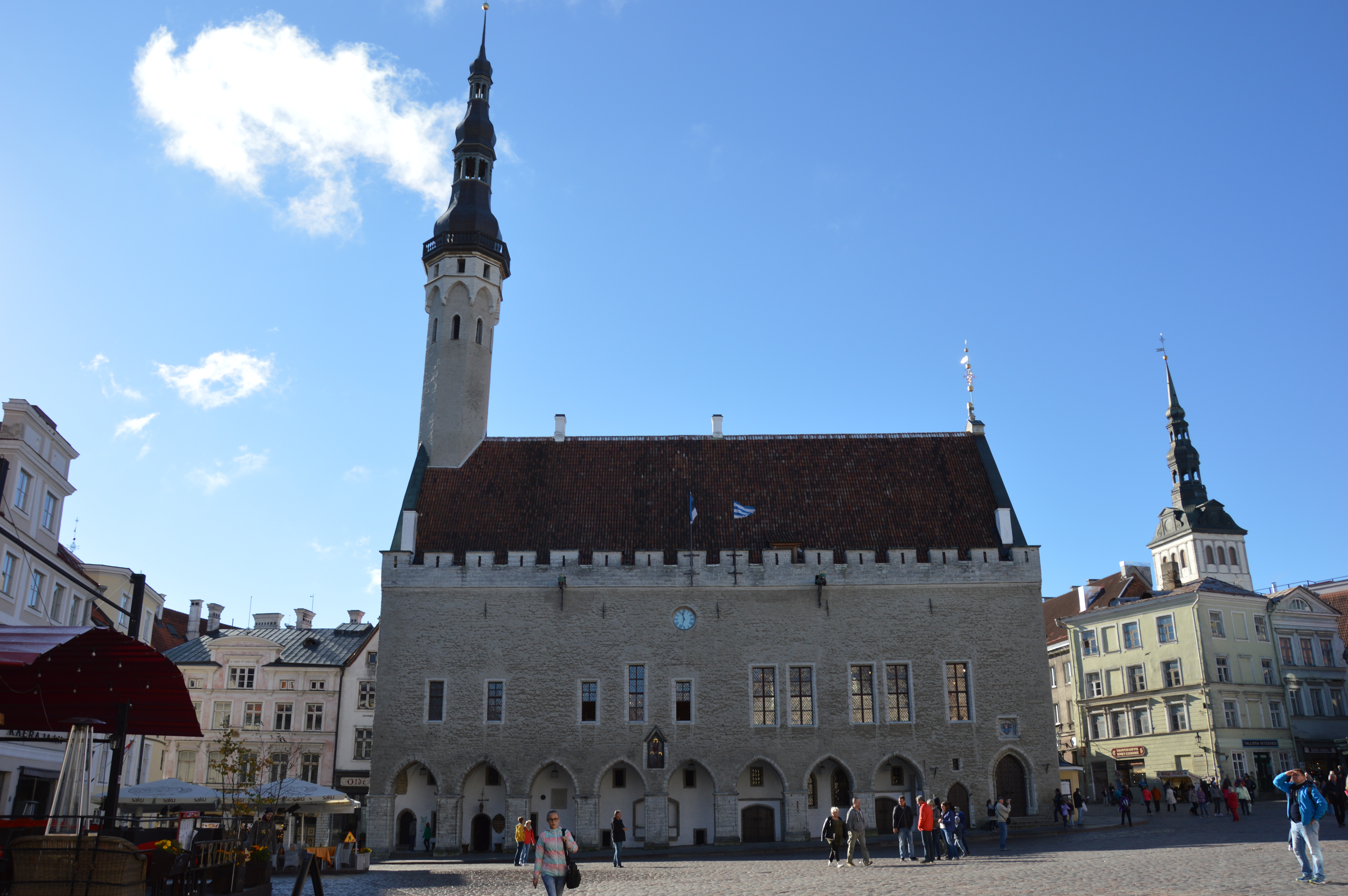 Rathausplatz mit Rathaus in Tallinn